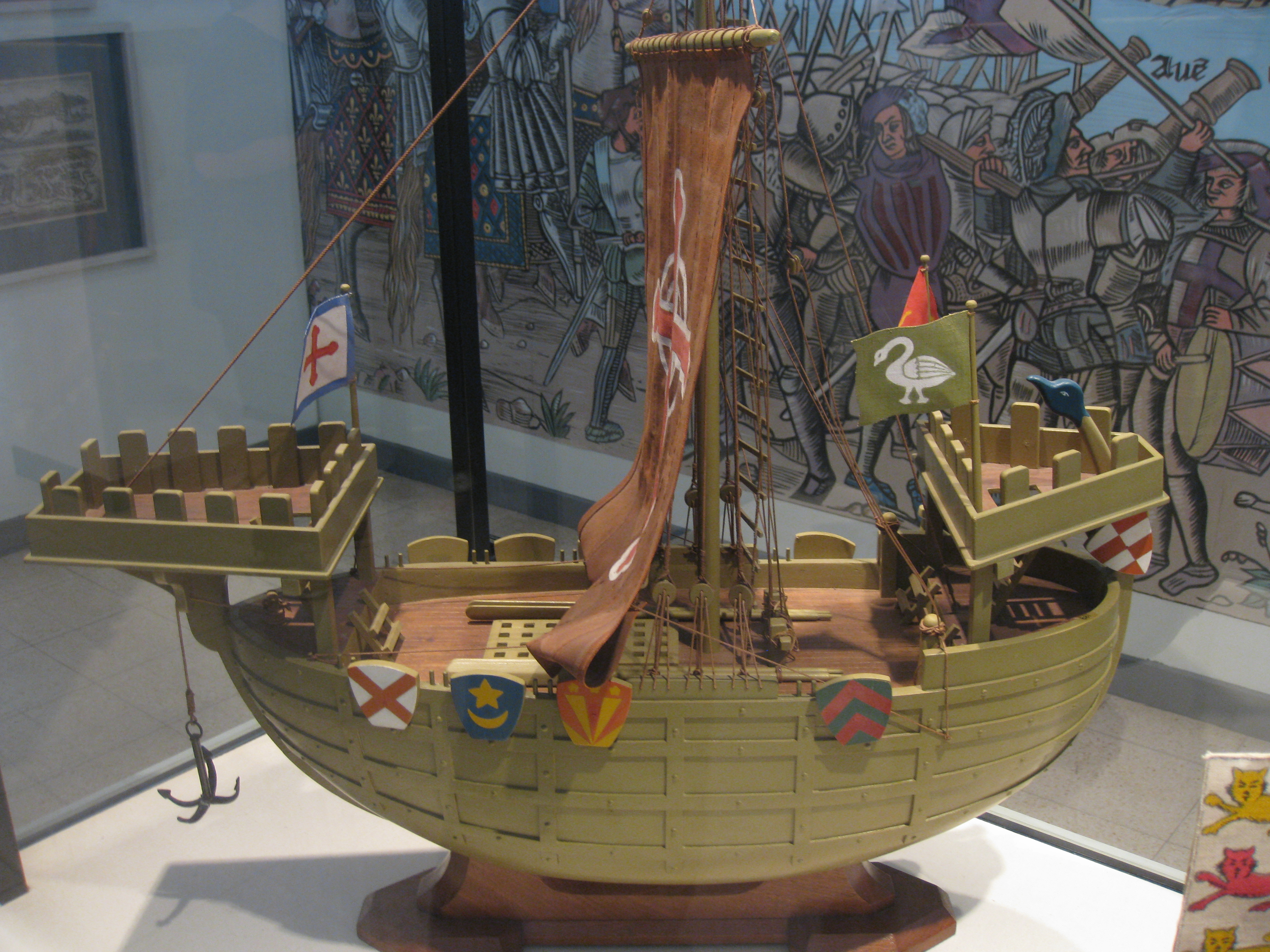 National Maritime Museum, Israel - Ship Models A model of a crusader warship from the 13th Century CE. wood. המוזיאון הימי הלאומי בחיפה דגמי ספינות דגם של ספינת מלחמה צלבנית מהמאה ה-13. הדגם עשוי עץ